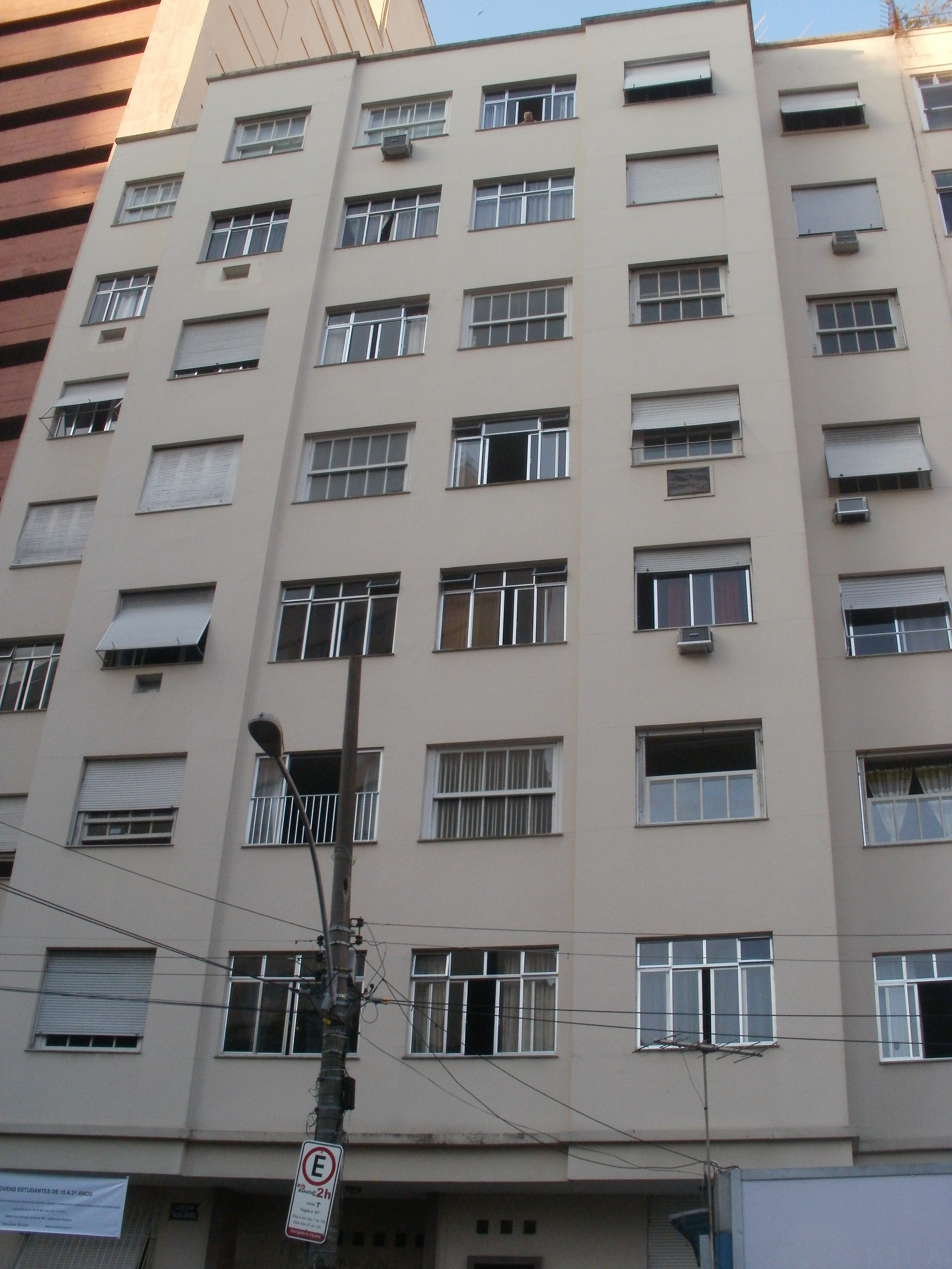 Edifício Tabajaras, na Rua Siqueira Campos, em Copacabana, Rio de Janeiro, Brasil.